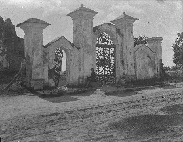 Беларуская (тарашкевіца): Быцень (Bycień), пляц Рынак (plac Rynak). Царква Сьвятога Язафата і манастыр базылянаў